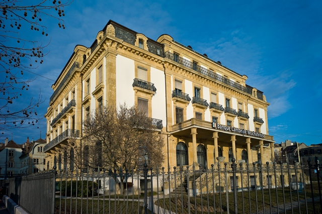 Siège de la Banque cantonale neuchâteloise